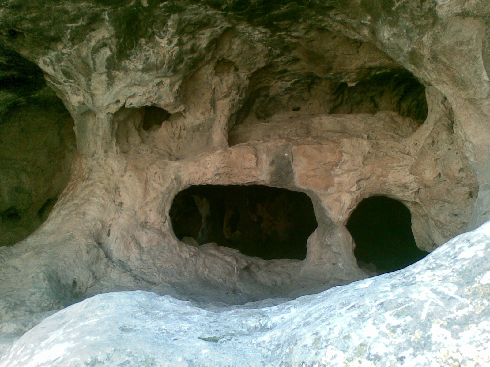 Halilim Wadi Near Mevaseret Zion, Israel מערות בנחל חלילים . נחל חלילים הוא נחל אכזב מצוקי מרשים שאורכו כקילומטר וחצי. הנחל יורד משוליה הצפוניים של מבשרת ציון מזרחה אל נחל שורק, העובר בעמק הארזים (שם עובר שביל ירושלים)